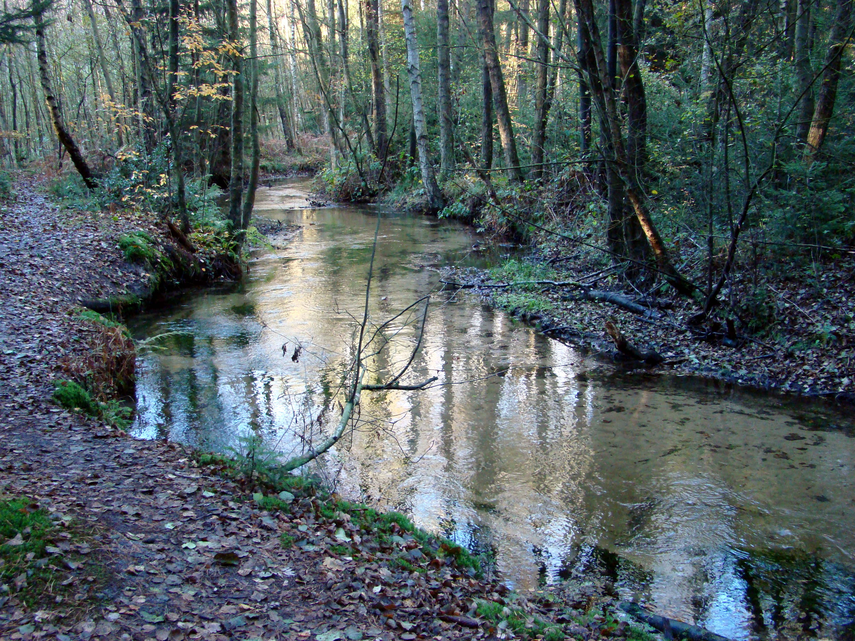 Der Weesener Bach (Lutterbach) bei Hermannsburg